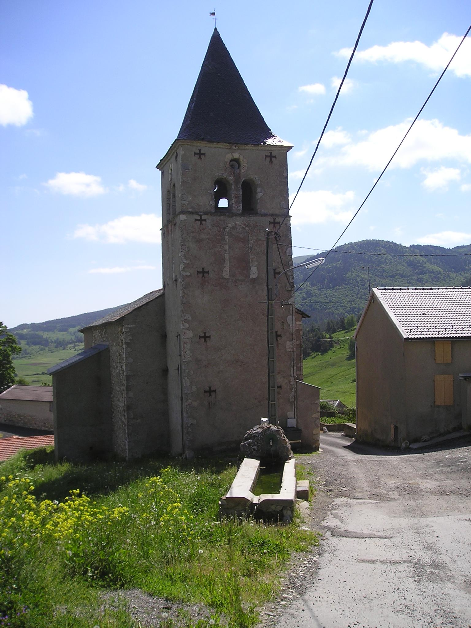 Die Kirche des Dorfes Montaillou, Ariège, Frankreich.